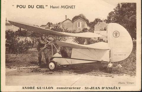 carte postale